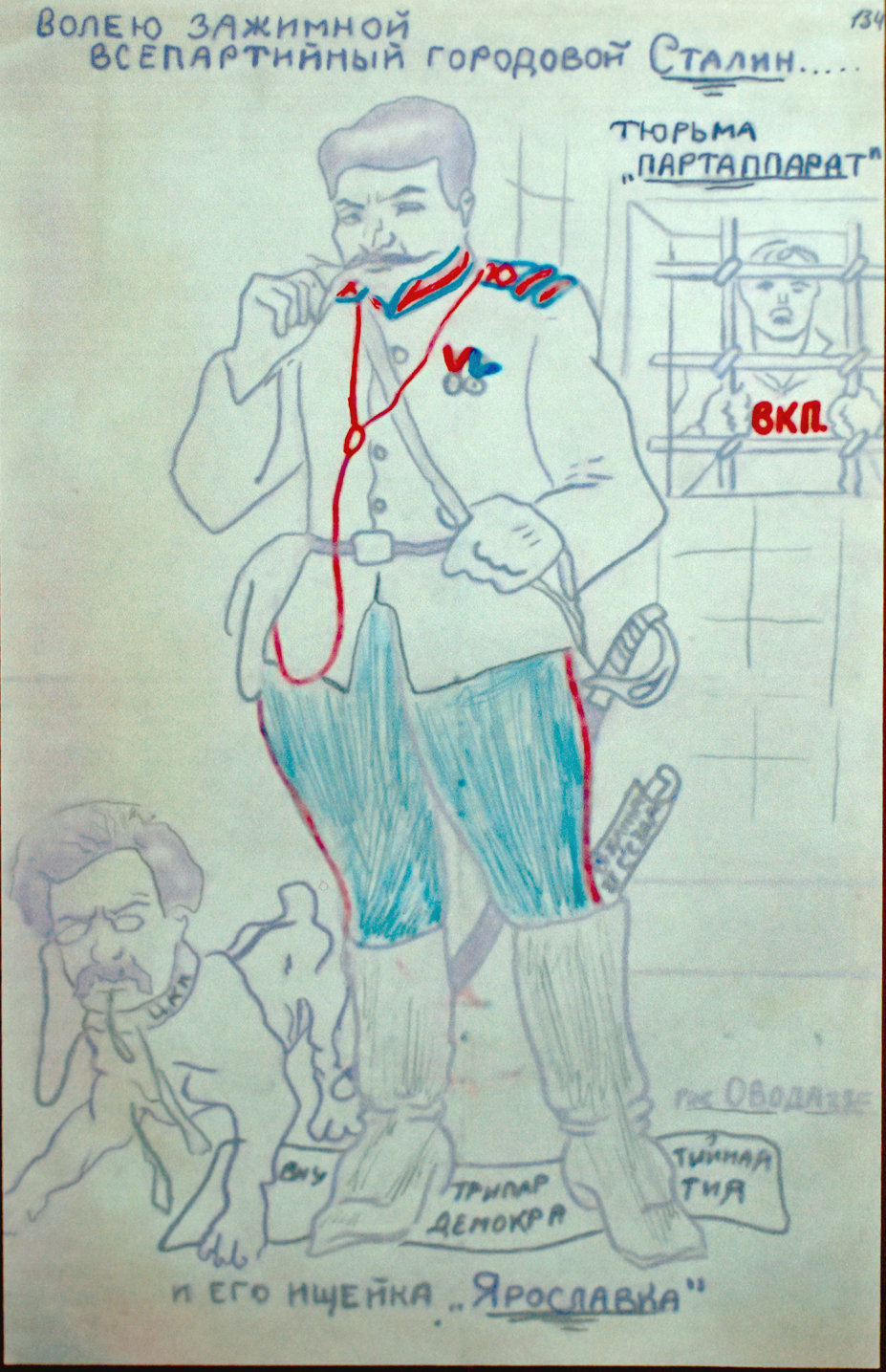 Карикатура на И.В. Сталина и Е. М. Ярославского. Распространялась "левой оппозицией" после XV съезда ВКП(б)